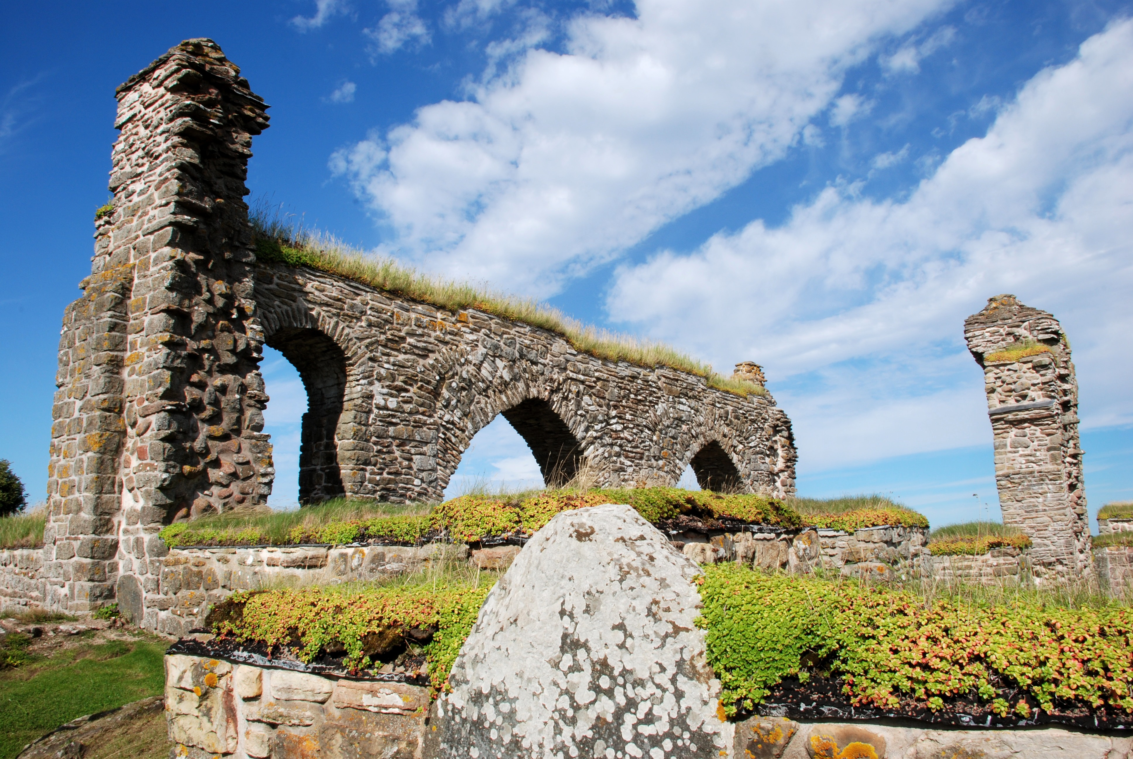 Gudhem 72:1